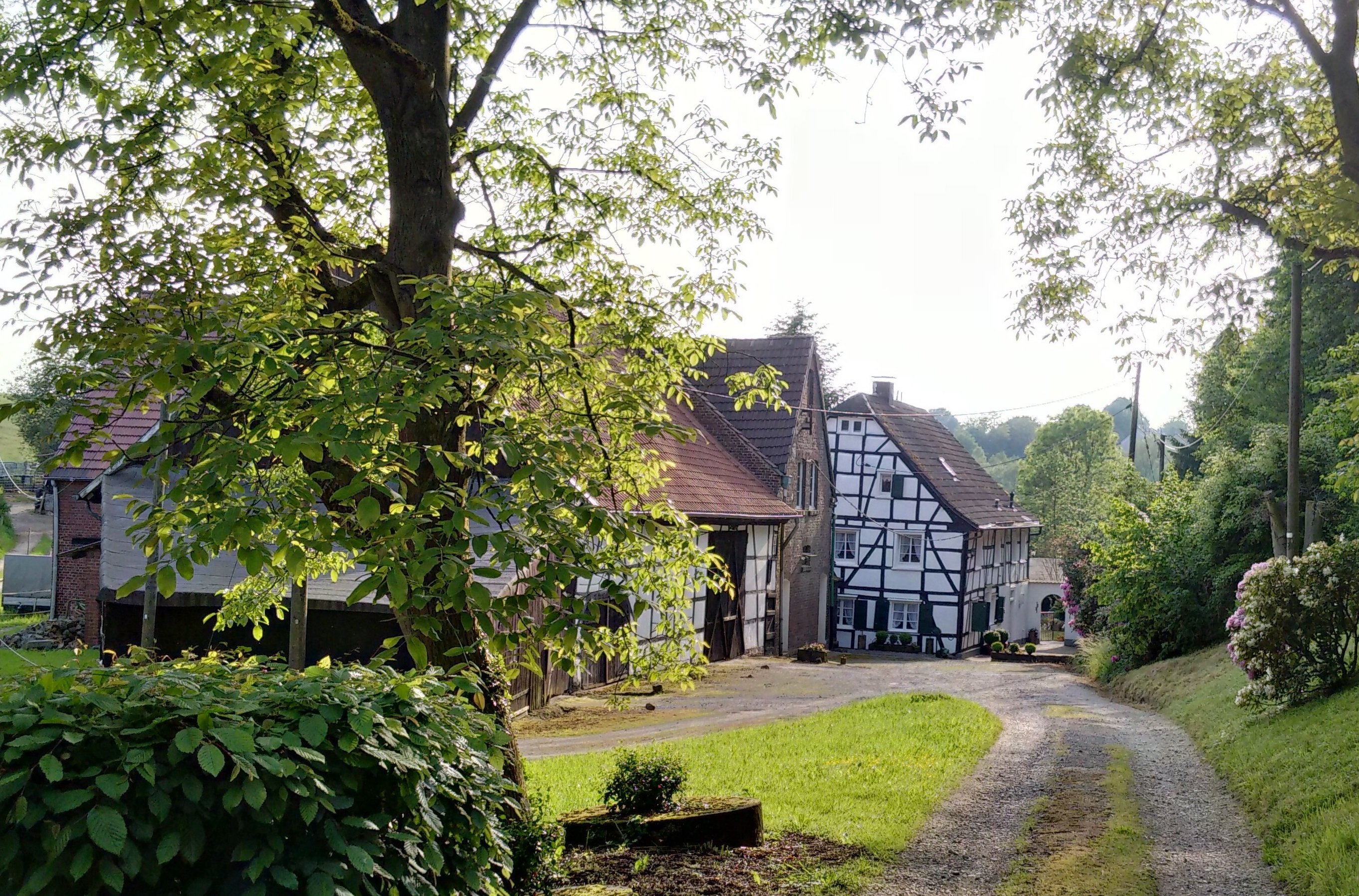 Bandesmühle in Solingen-Gräfrath, aufgenommen im Frühling 2016